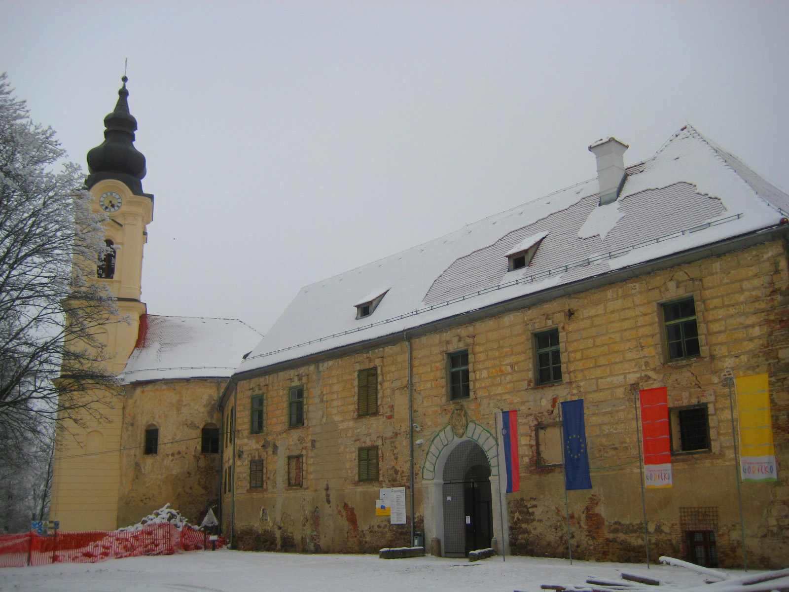 Grad Grad, castle in Goričko, Prekmurje, Slovenia